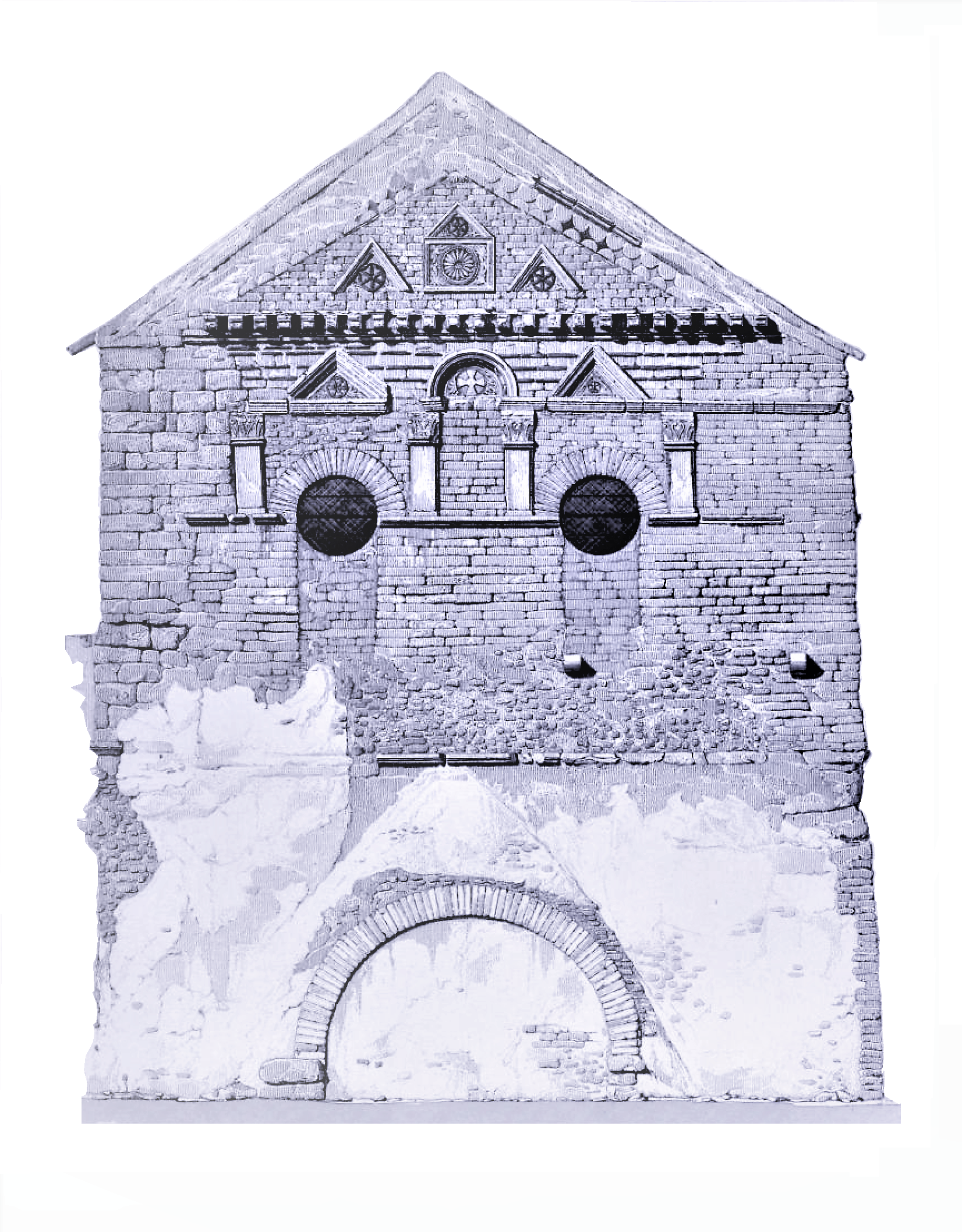 Baptistère de Poitiers, façade Sud en 1857 (image du domaine public (Gailhabaud) modifiée)